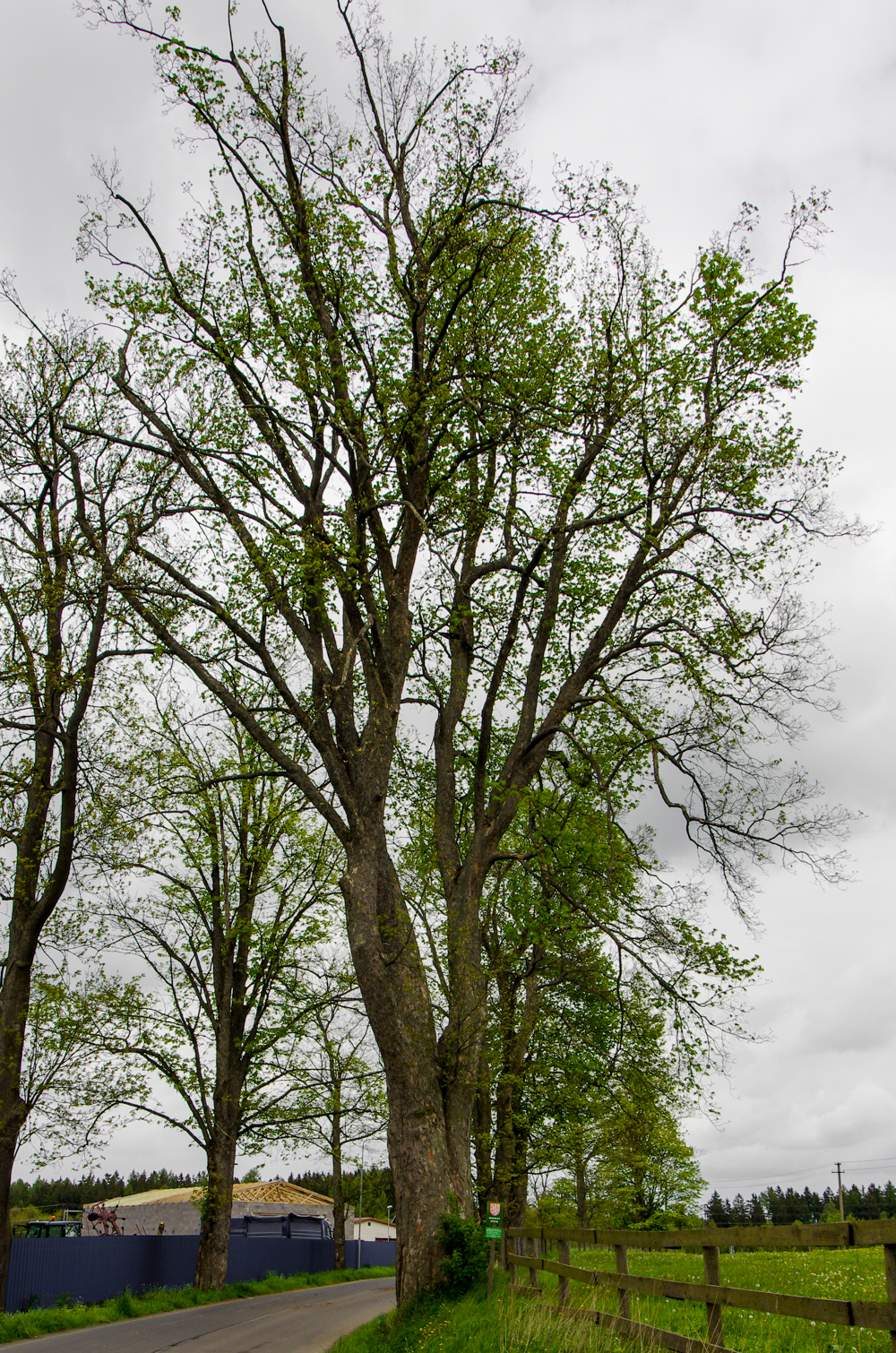 památný strom - Klen v Jindřichovicích, okres Sokolov